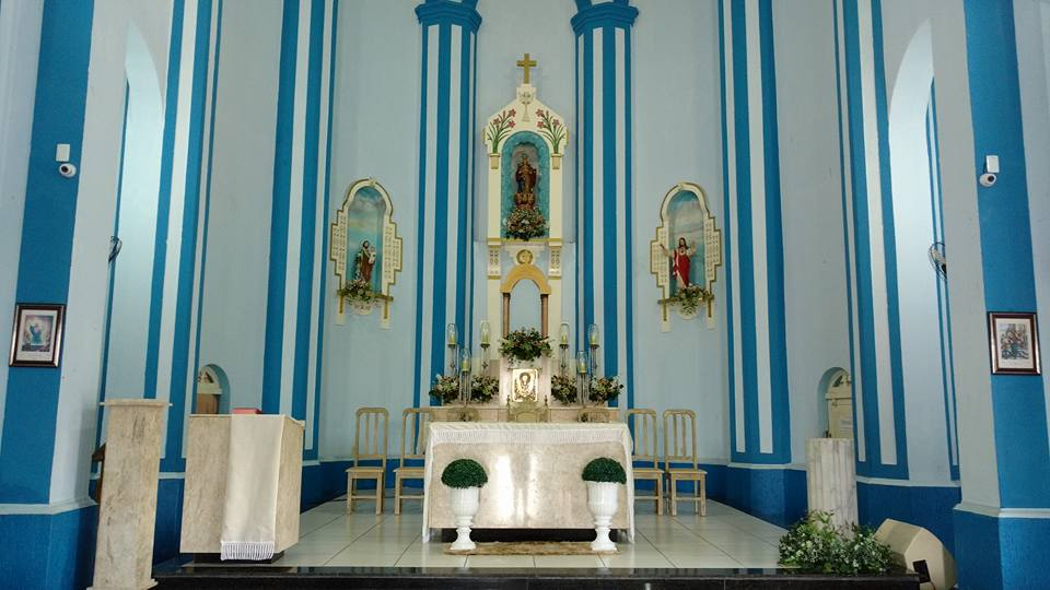 Presbitério da igreja matriz de N. S. da Conceição